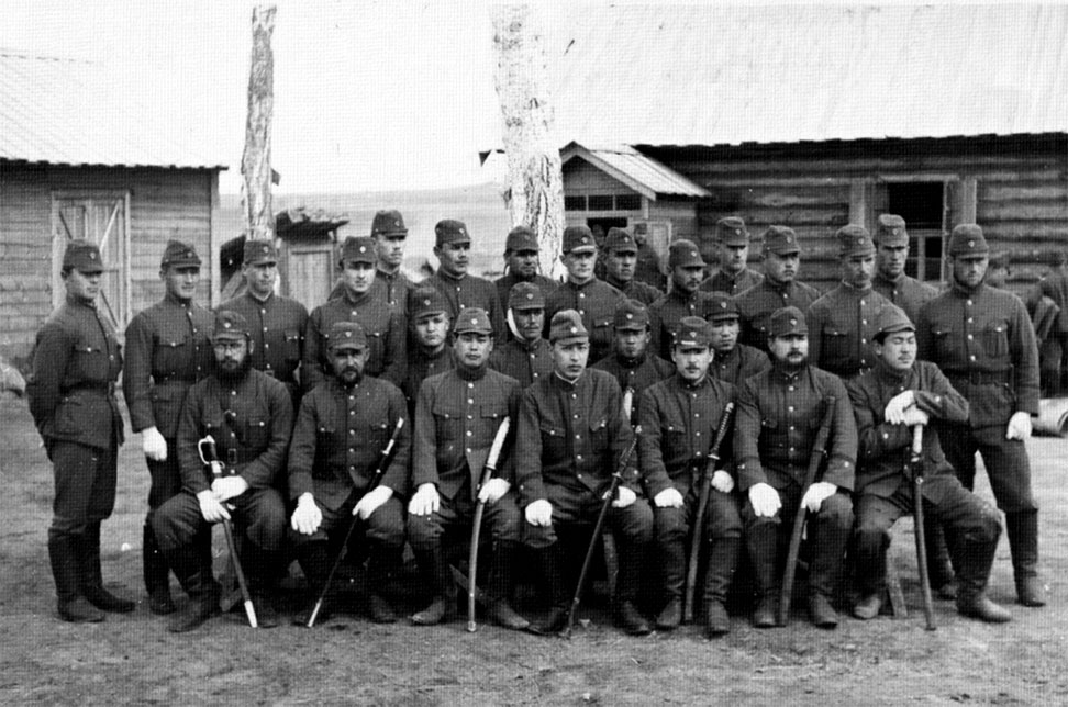 Отряд "Асано"